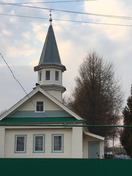 Мечеть Инся